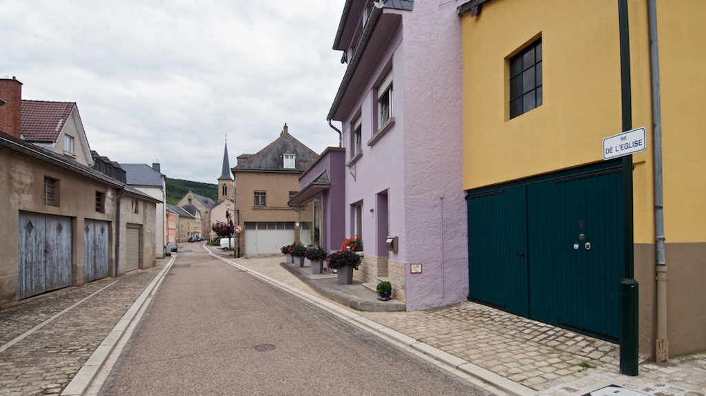 Kierchstrooss zu Meechtem.